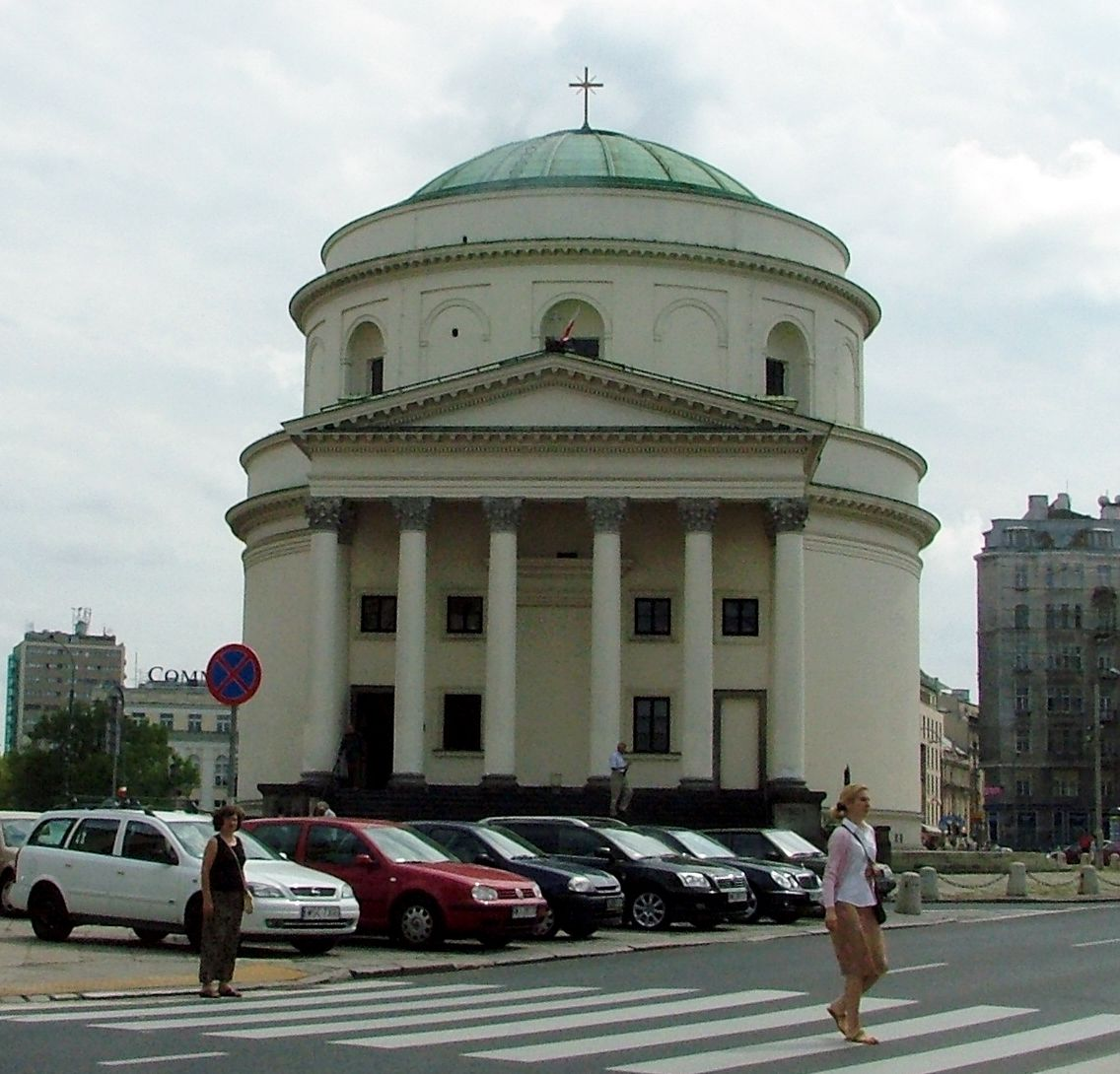 PL, Warsaw, Poland, Kościół św. Aleksandra w Warszawie